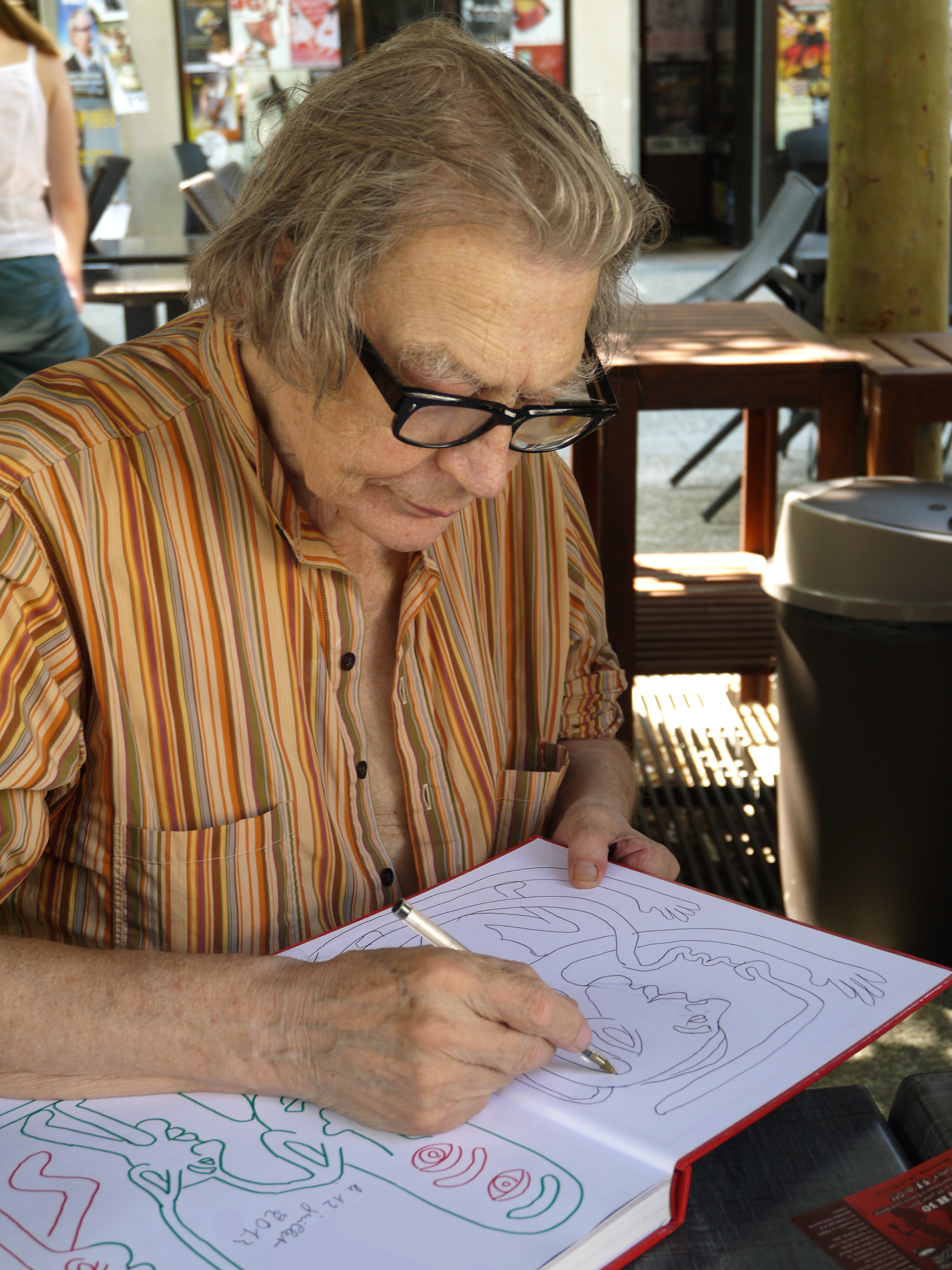 Yvon Taillandier en train de dédicacer le livre « Taillandier par Yvon Taillandier », à Avignon le 12 juillet 2013